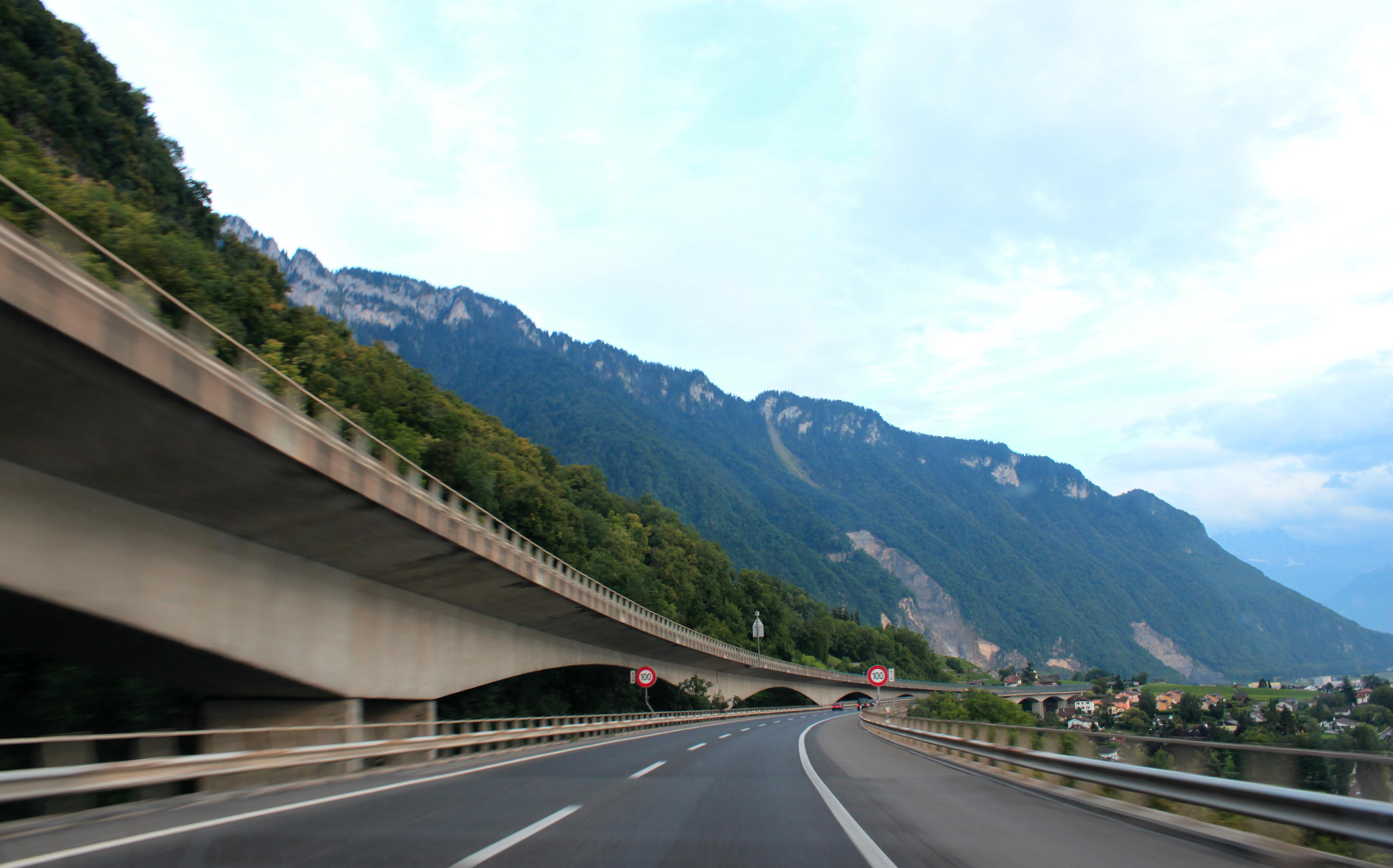 Suisse, Vaud, Veyaux, viaduc sur l'A9, vue depuis l'autoroute.